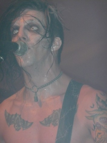 Live-Foto der Band Blitzkid